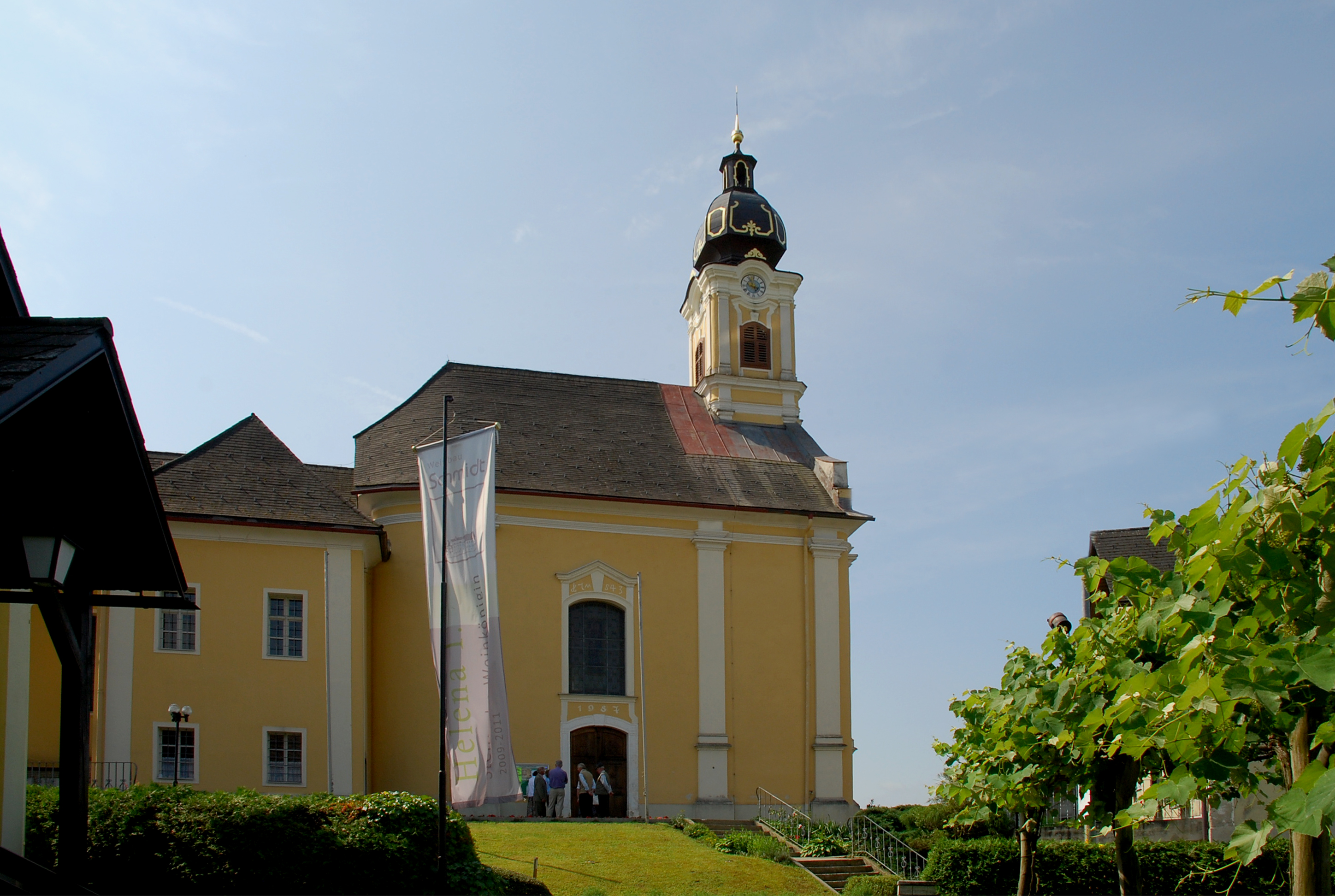 Sulmeck-Greith, Ortsteil Kopreinig, Steiermark, Österreich: Kirche St. Ulrich im Greith